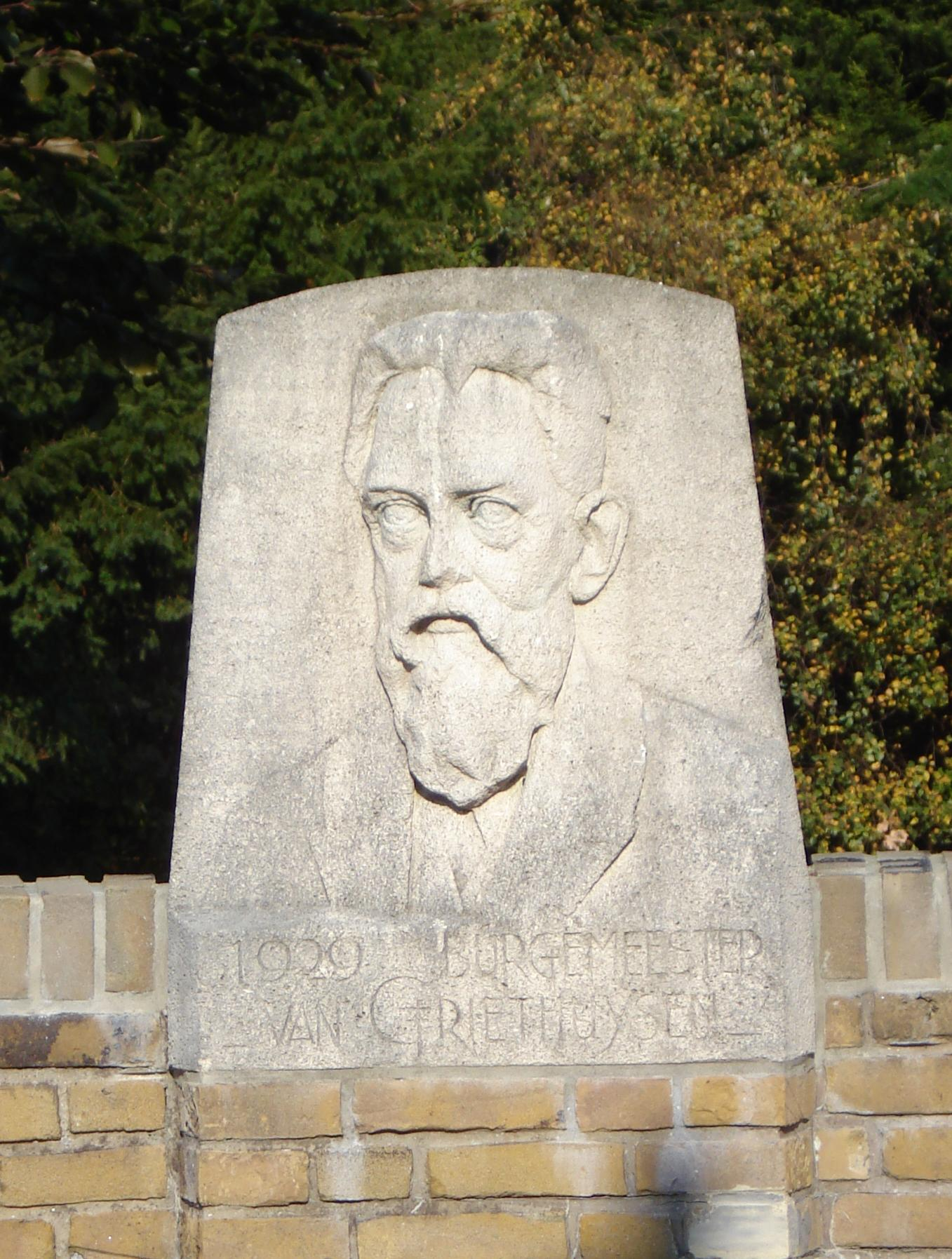 Oegstgeest, Griethuysen plein. Kunstwerk "Relief Burg. Griethuysen". Oegstgeest/The Netherlands. FOP.